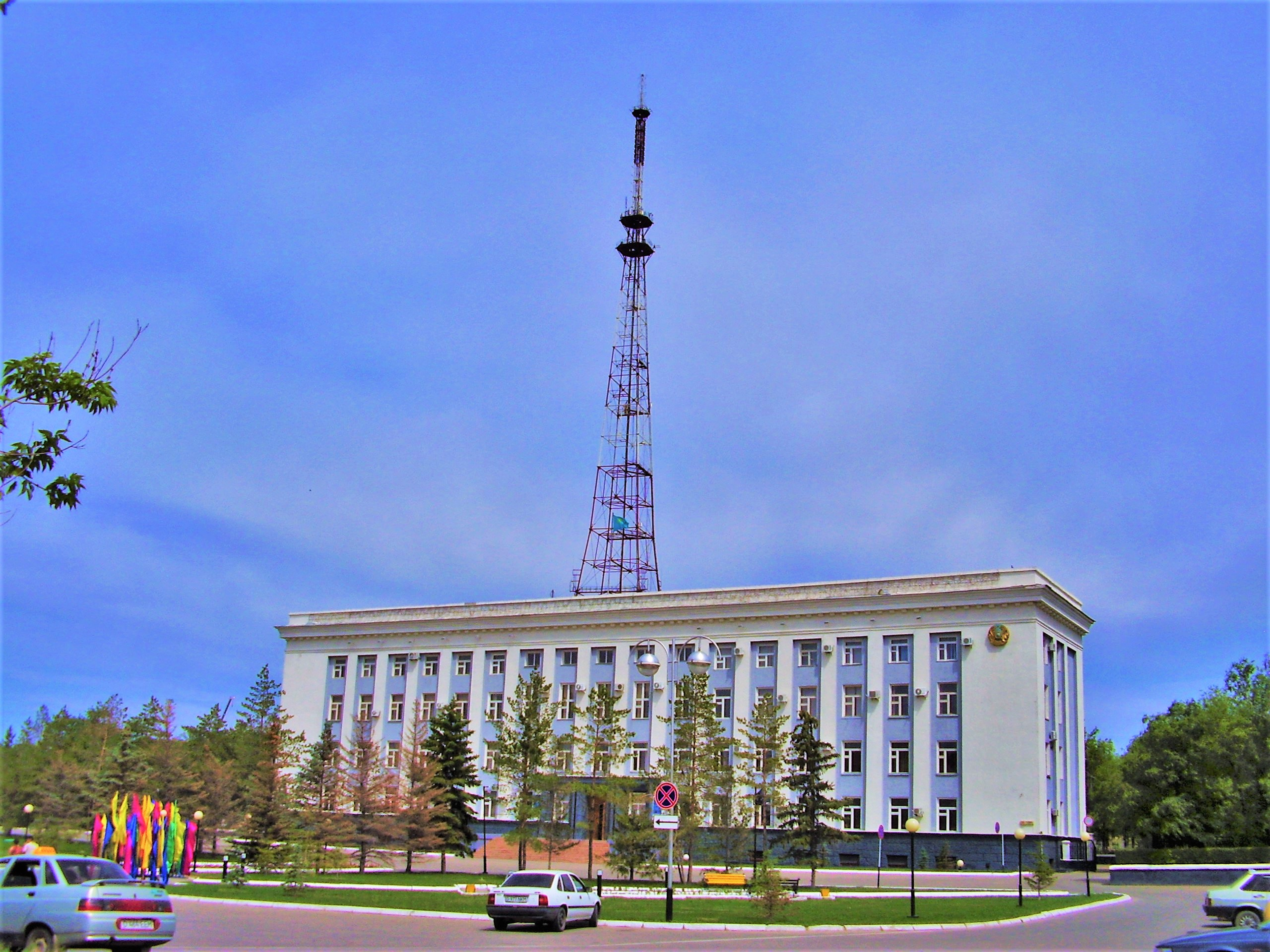 Актюбинск.